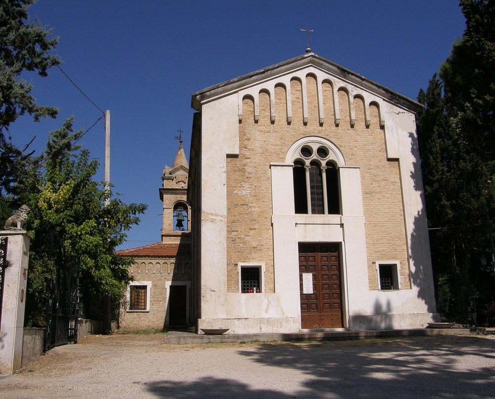 Francavilla al Mare